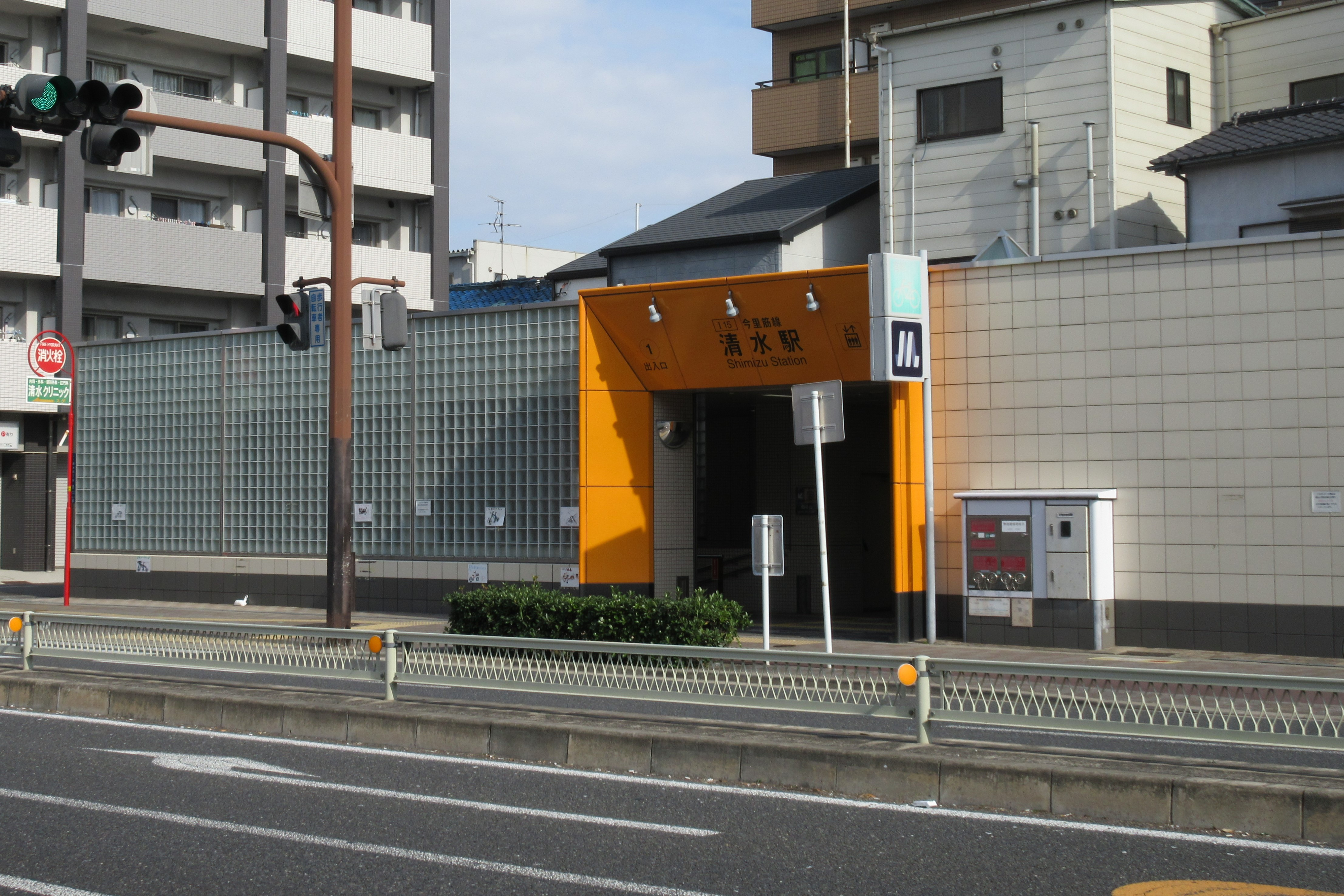 大阪市高速電気軌道（Osaka Metro）清水駅